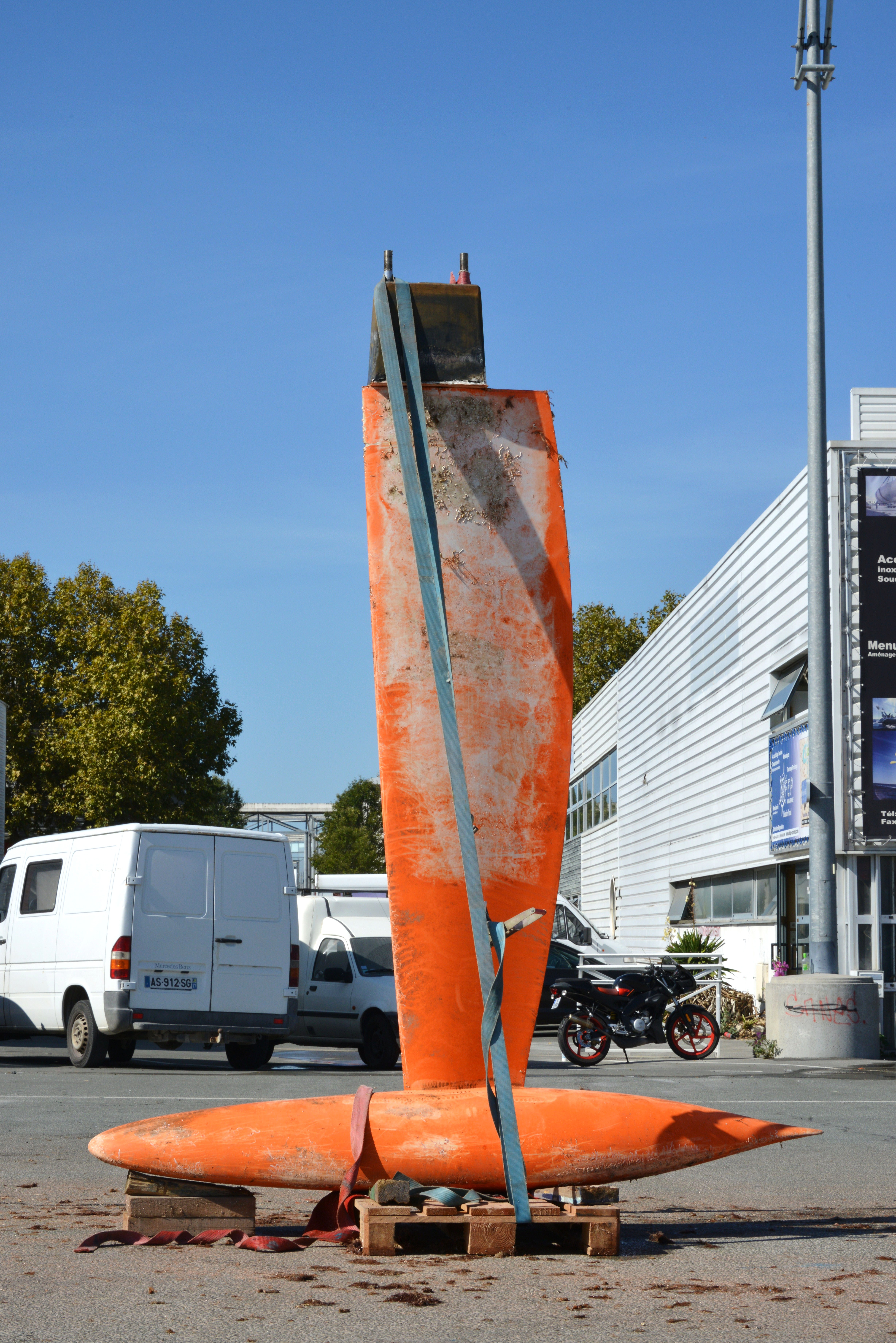 La quille du voilier de course Class 40 « La Belle Equipe 2 ». Ce bateau de course a été lancé en 2007 sous le nom de « Magalé ». Plateau nautique de la Ville en Bois. La Rochelle, Charente-Maritime, France.